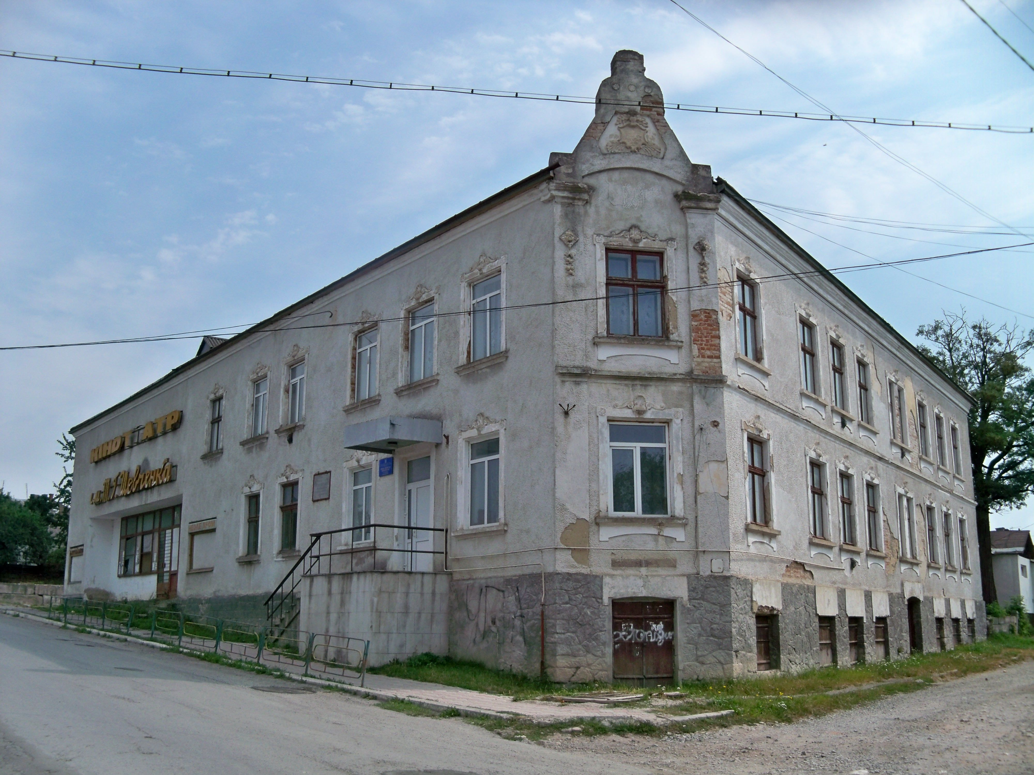 Український народний дім(мур.), Копичинці, вул. Галана, 9